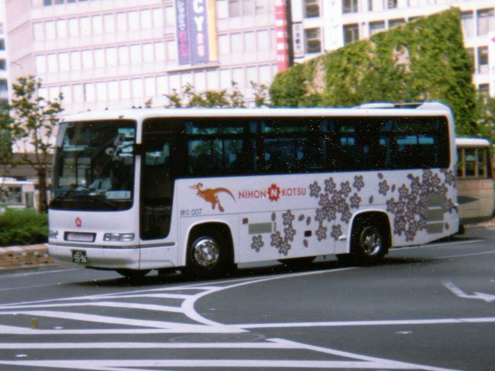 Nihon Kotsu (Tokyo) Hino U-RU1HHAB at Shinjuku Sta.